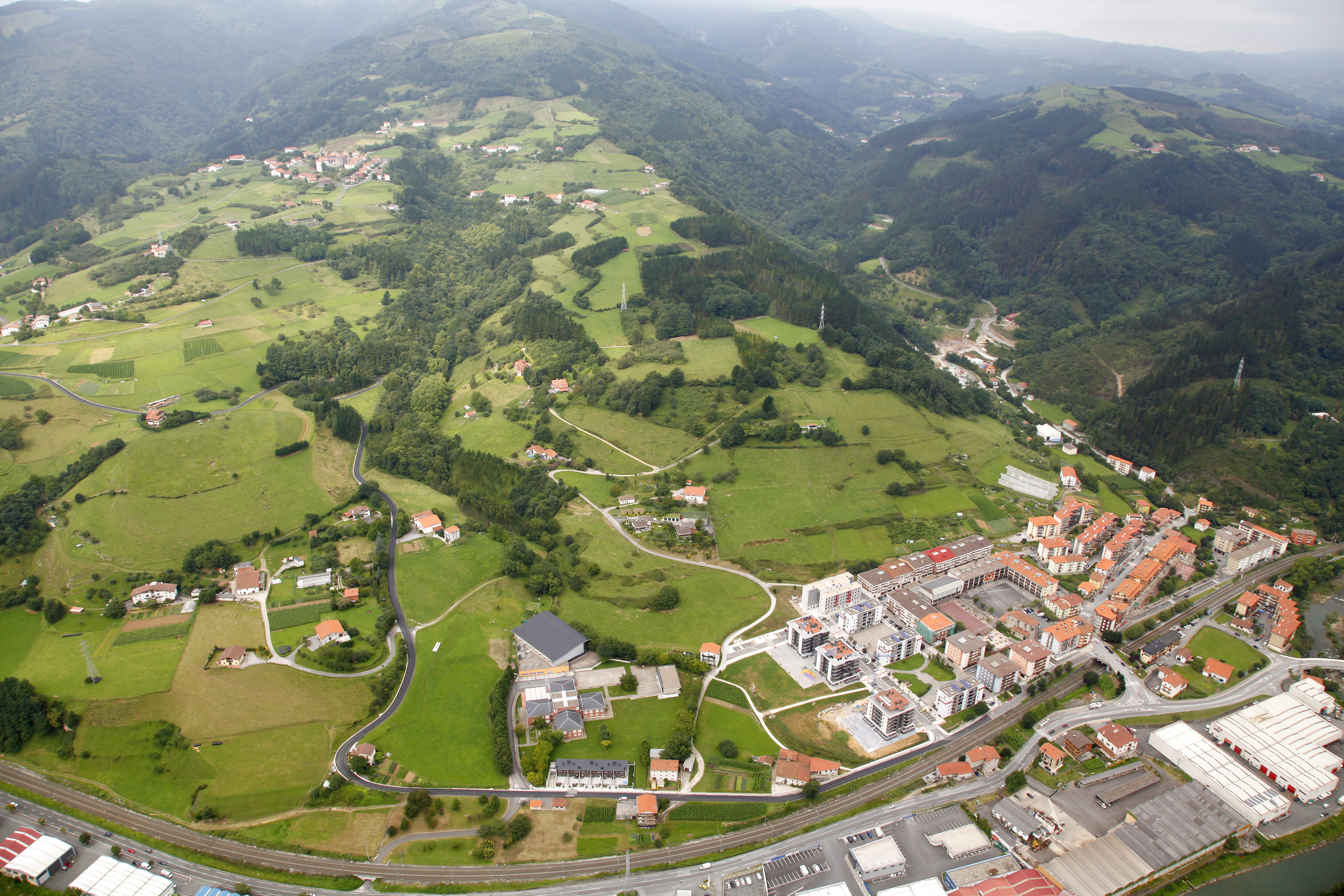 Anoetako ikuspegi orokorra. Atzean Hernialde eta Alkiza ikusten dira.